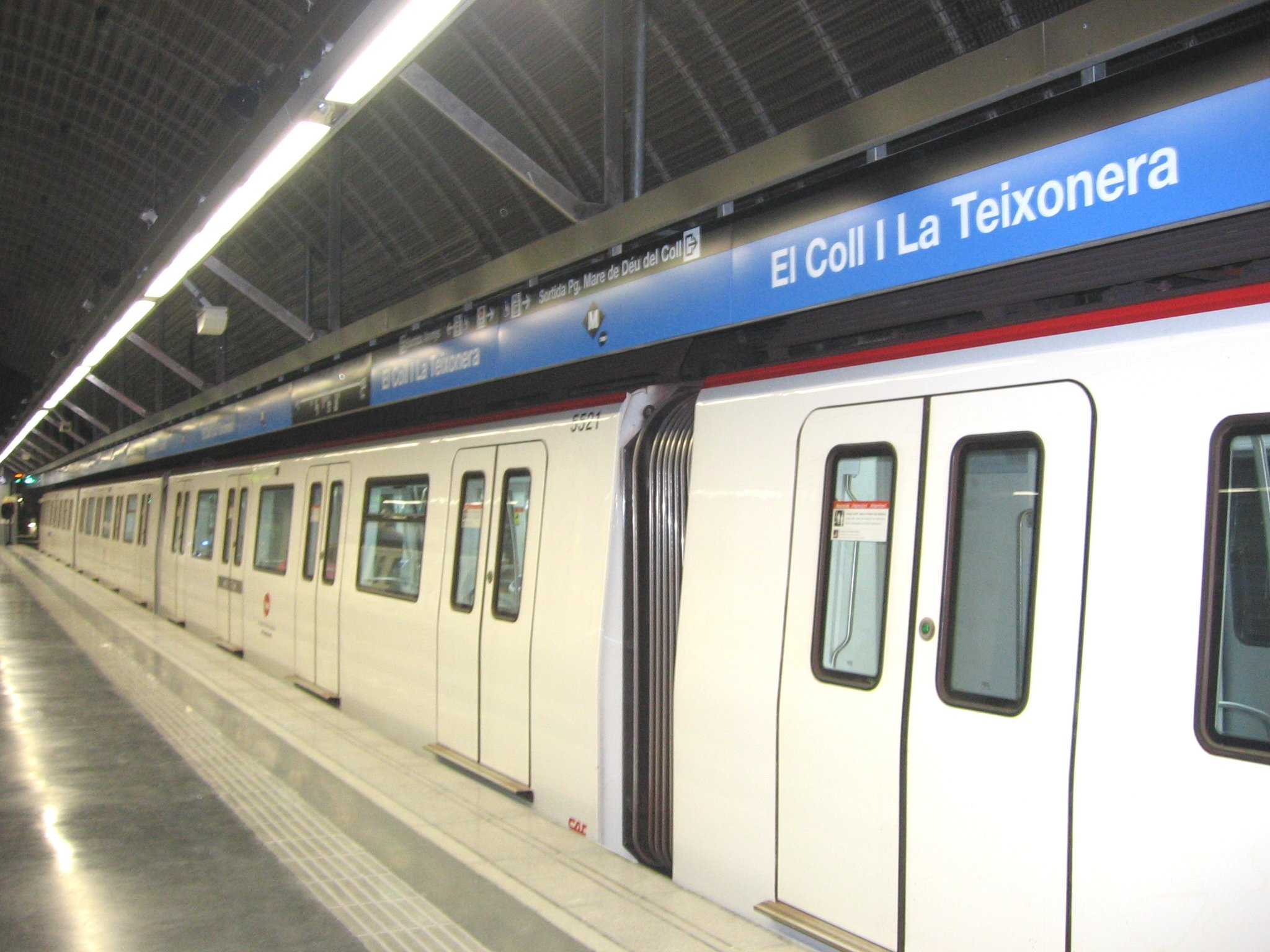 Estació El Coll - La Teixonera, L5 del Metro de Barcelona.